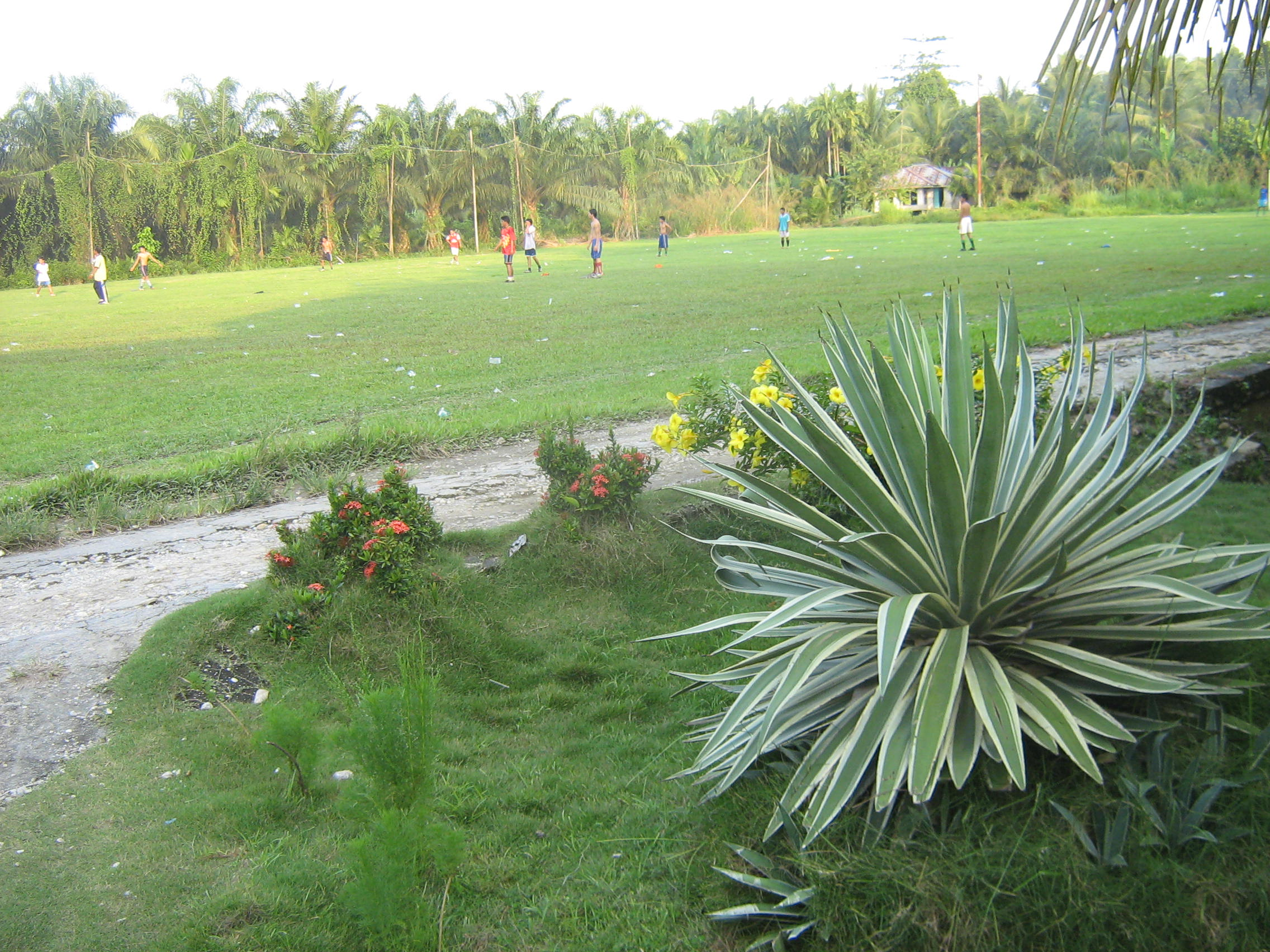 Terantang